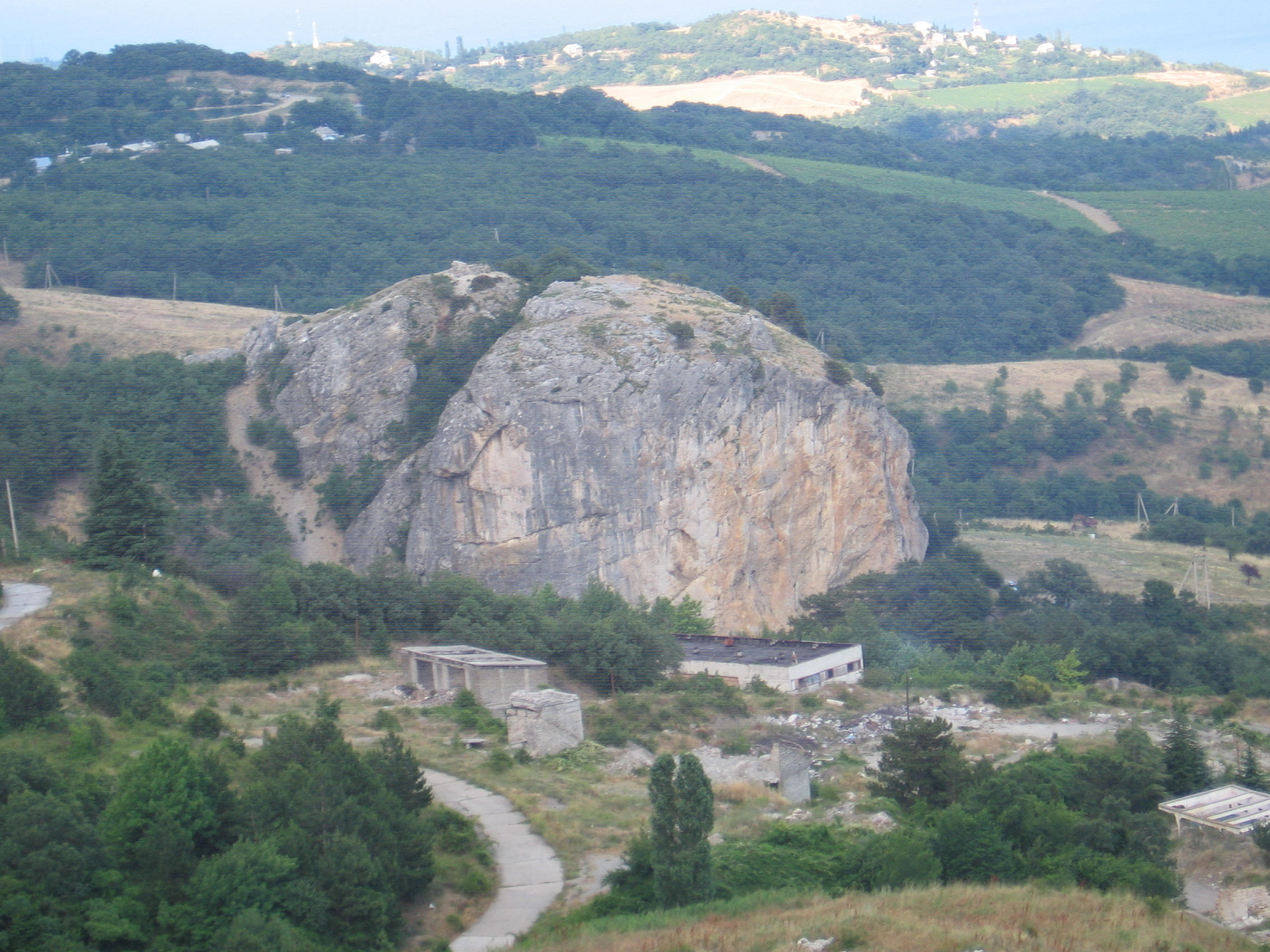 Червоний камінь